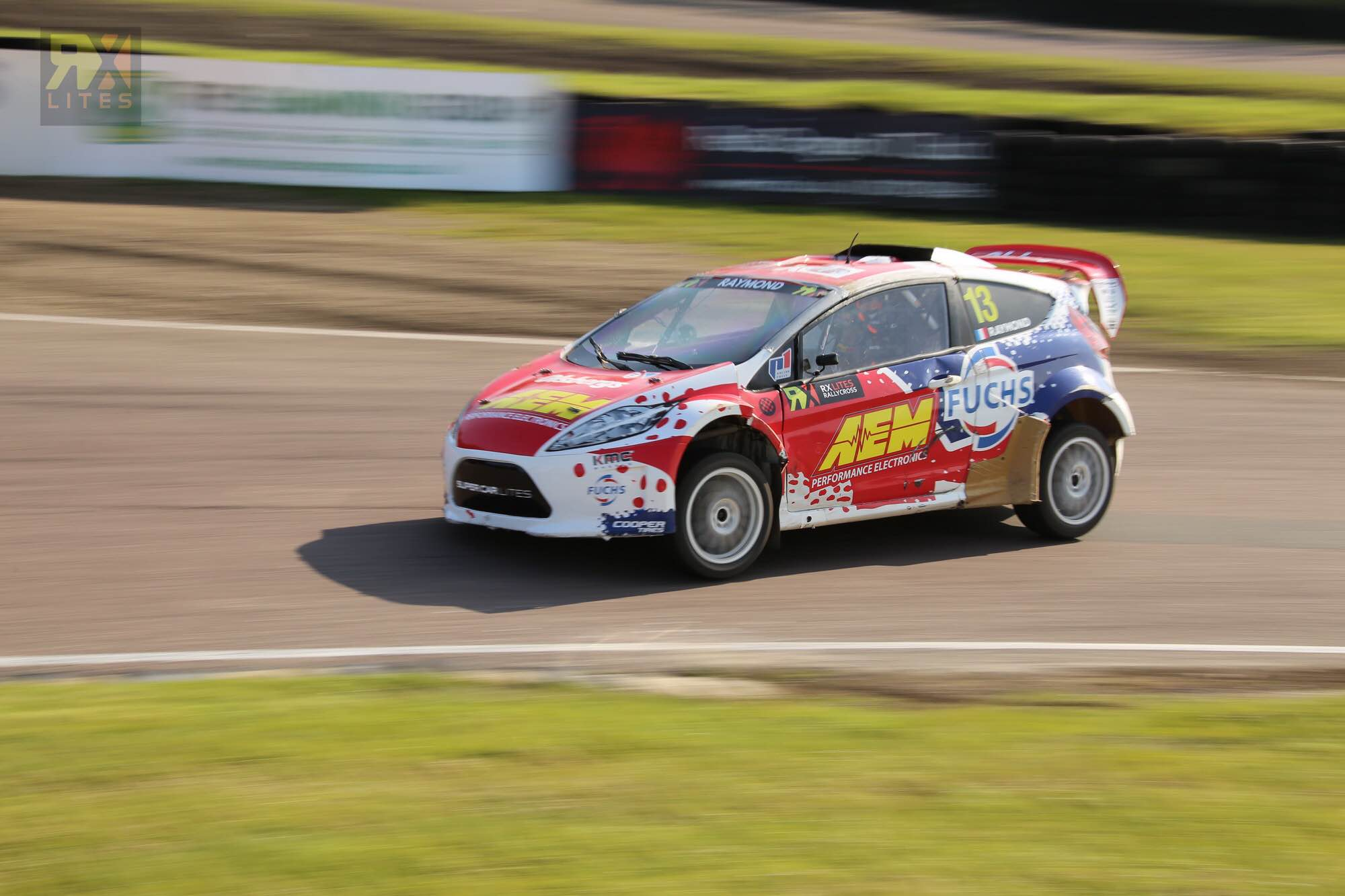 Photographie de Cyril Raymond et sa Ford Fiesta en championnat du monde de rallycross FIA en 2016 (catégorie RX Lites).